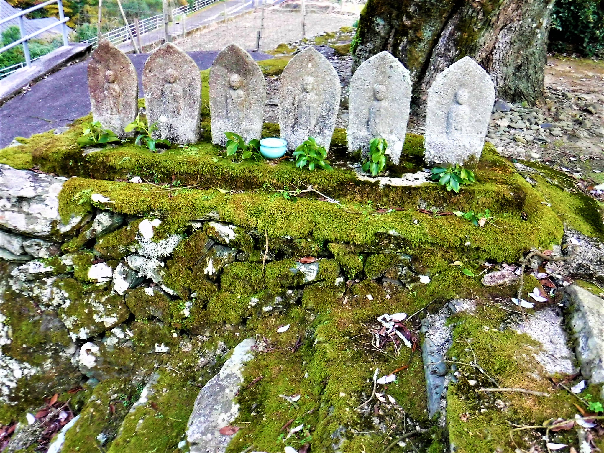 愛媛県西条市藤之石丙 下津池のお堂にある六地蔵